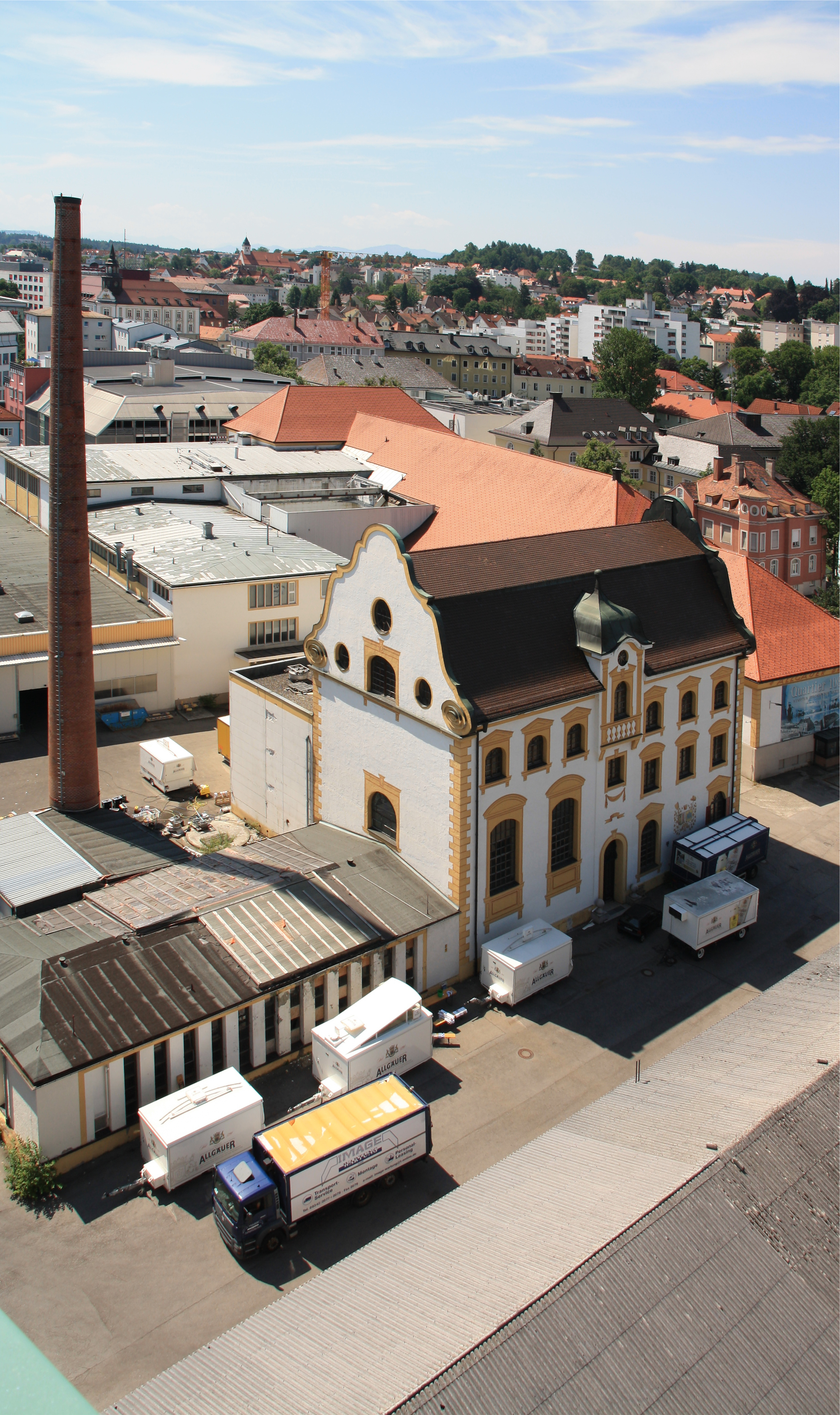 Das Sudhaus in Kempten, Aufnahme von der Dachterrasse des Parkhotels in Kempten